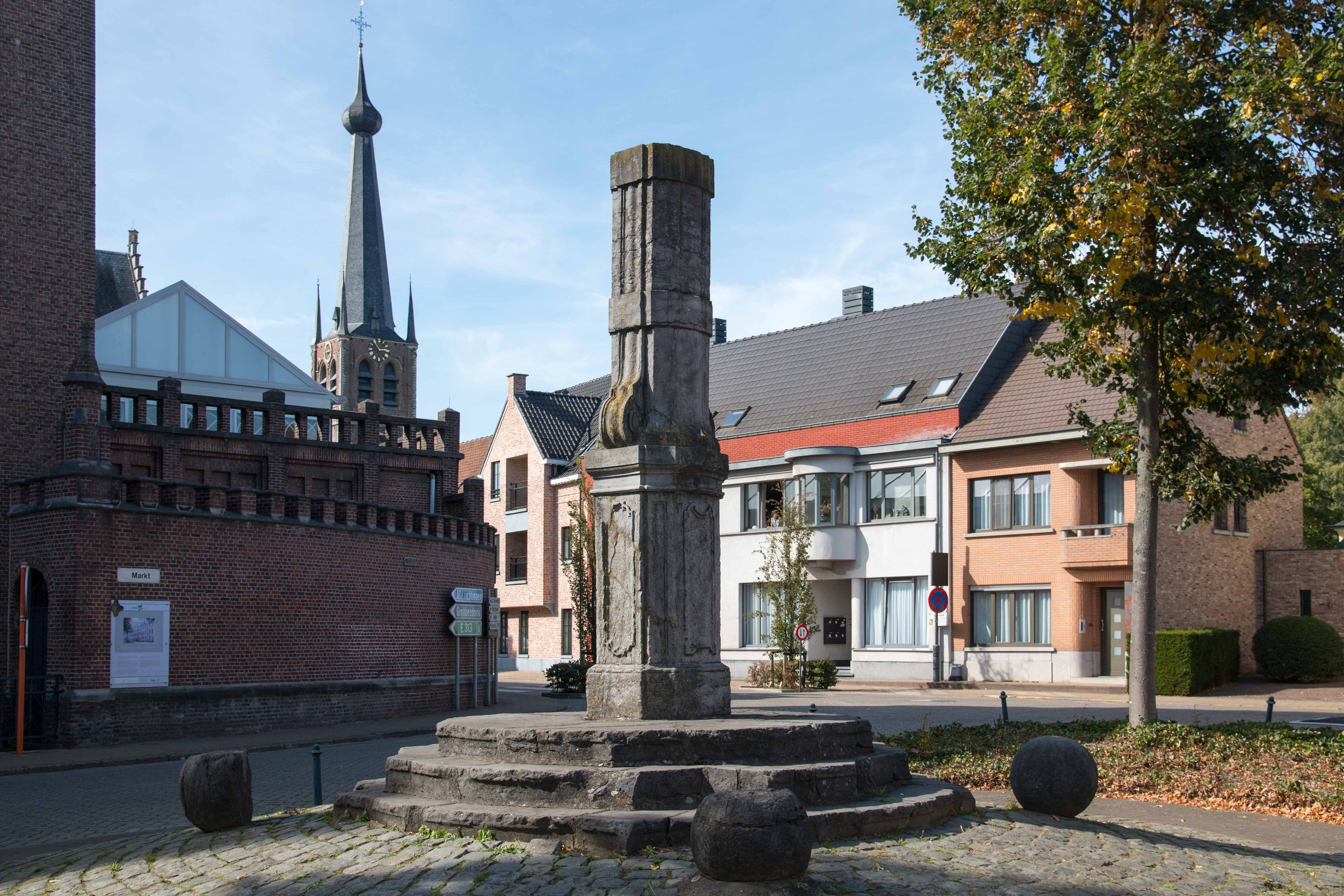 Schandpaal of kaak op de Markt in Vorselaar This photo of immovable heritage has been taken in the Flemish Region